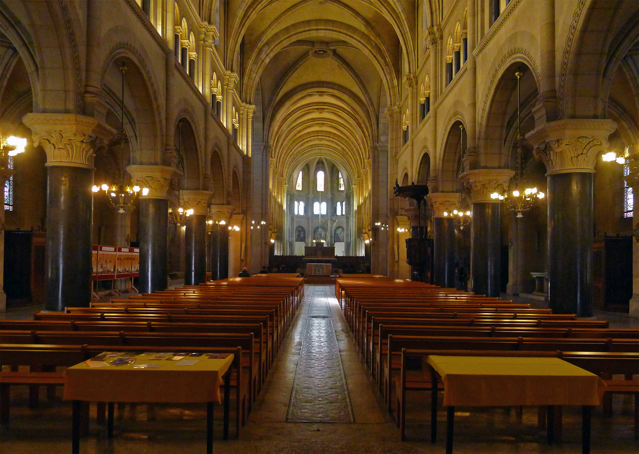 Église Saint-Joseph-des-Nations (nef principale) - Paris XI